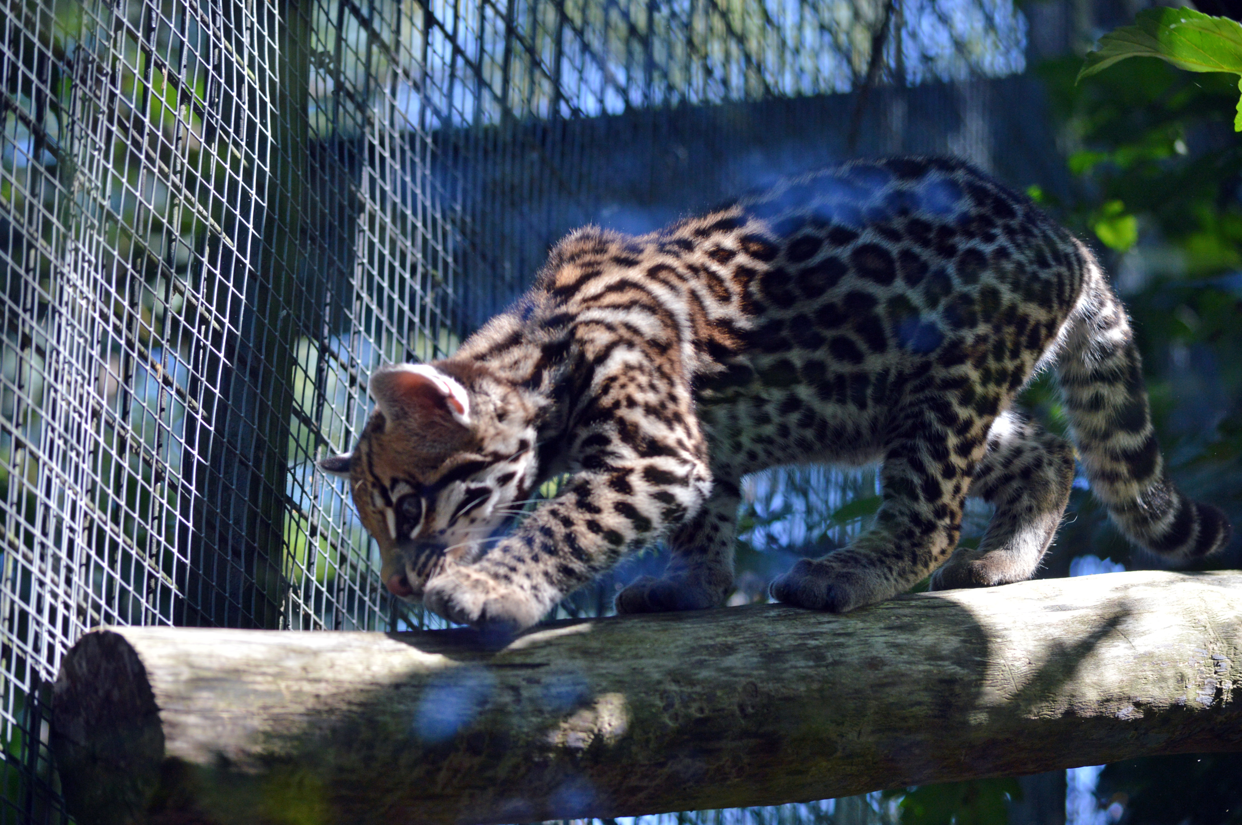 Ocelot (Zoo-Amiens)